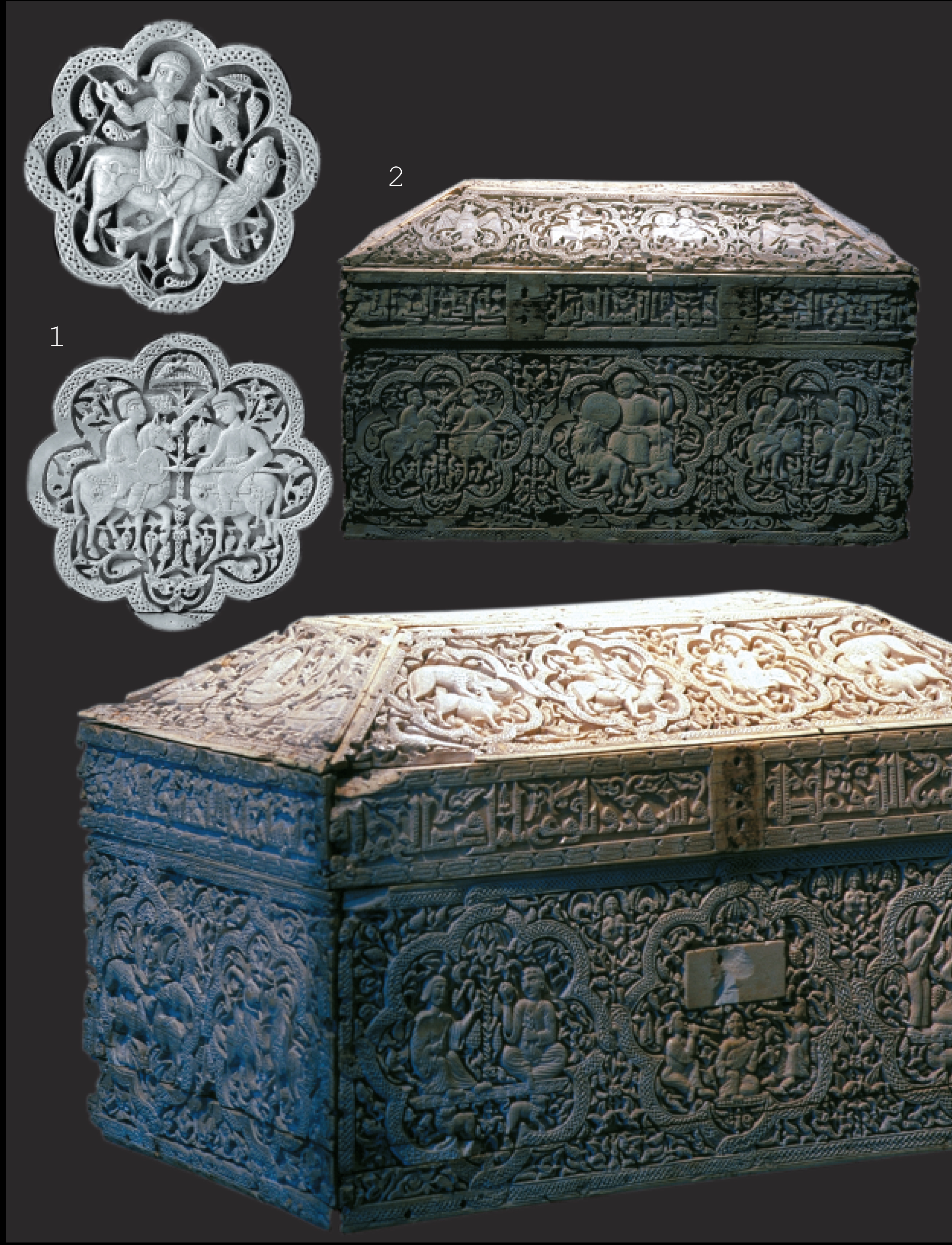 Leireko kutxa